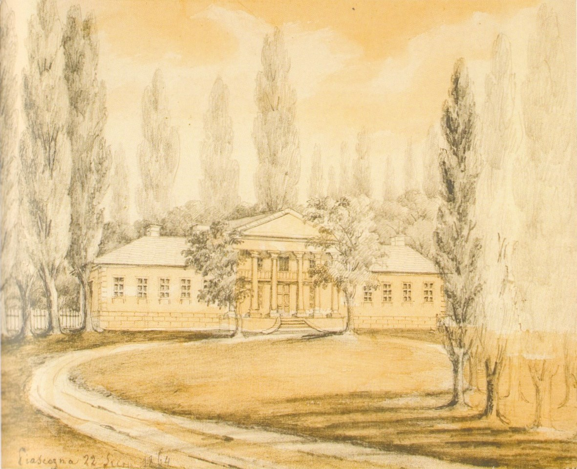 Беларуская (тарашкевіца): Пясечна (Piasiečna), сядзіба Наркевічаў-Ёдкаў (Narkievič-Jodka)